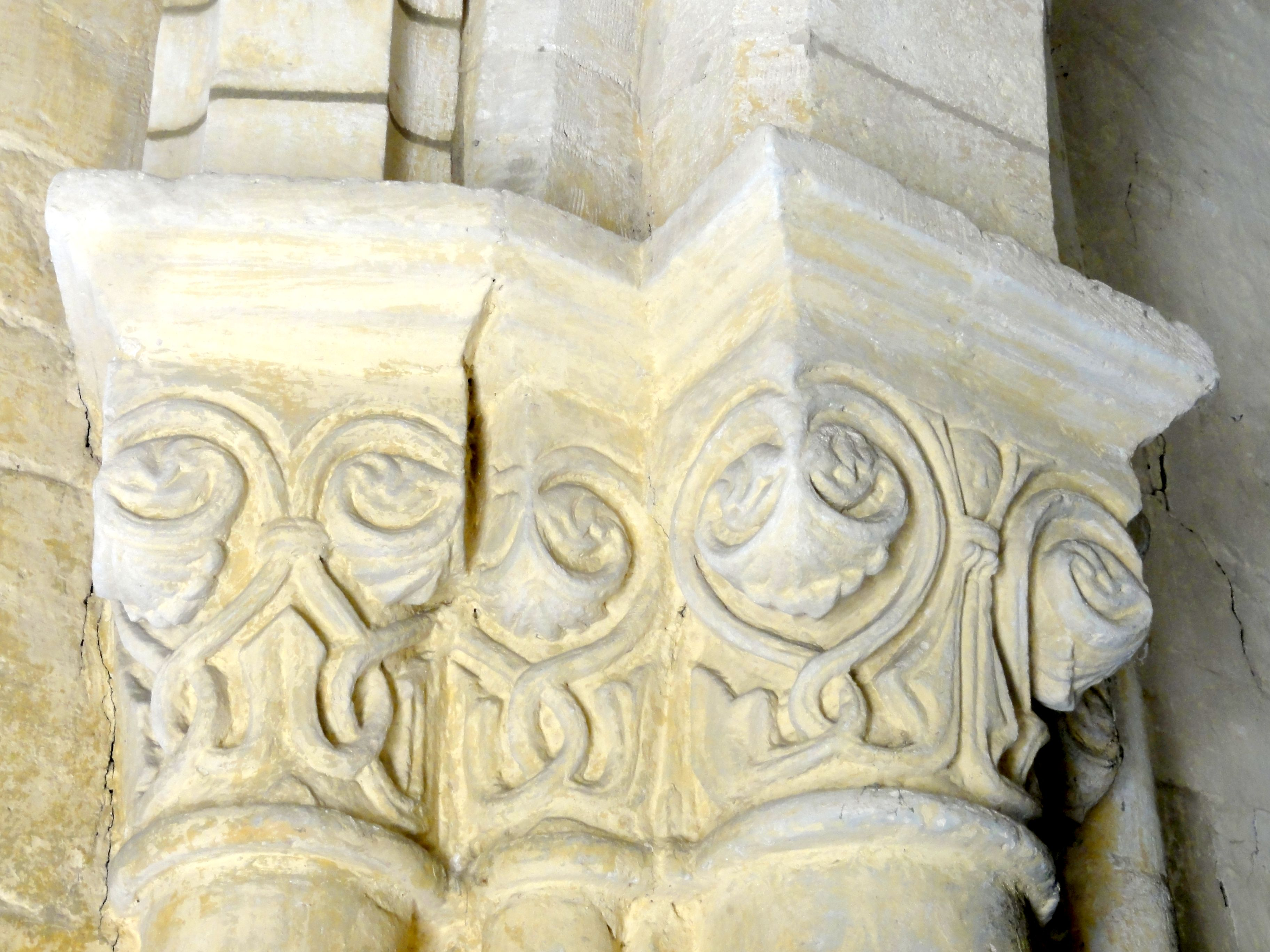 Grandes arcades du sud, chapiteaux côté ouest (au droit du mur occidental).